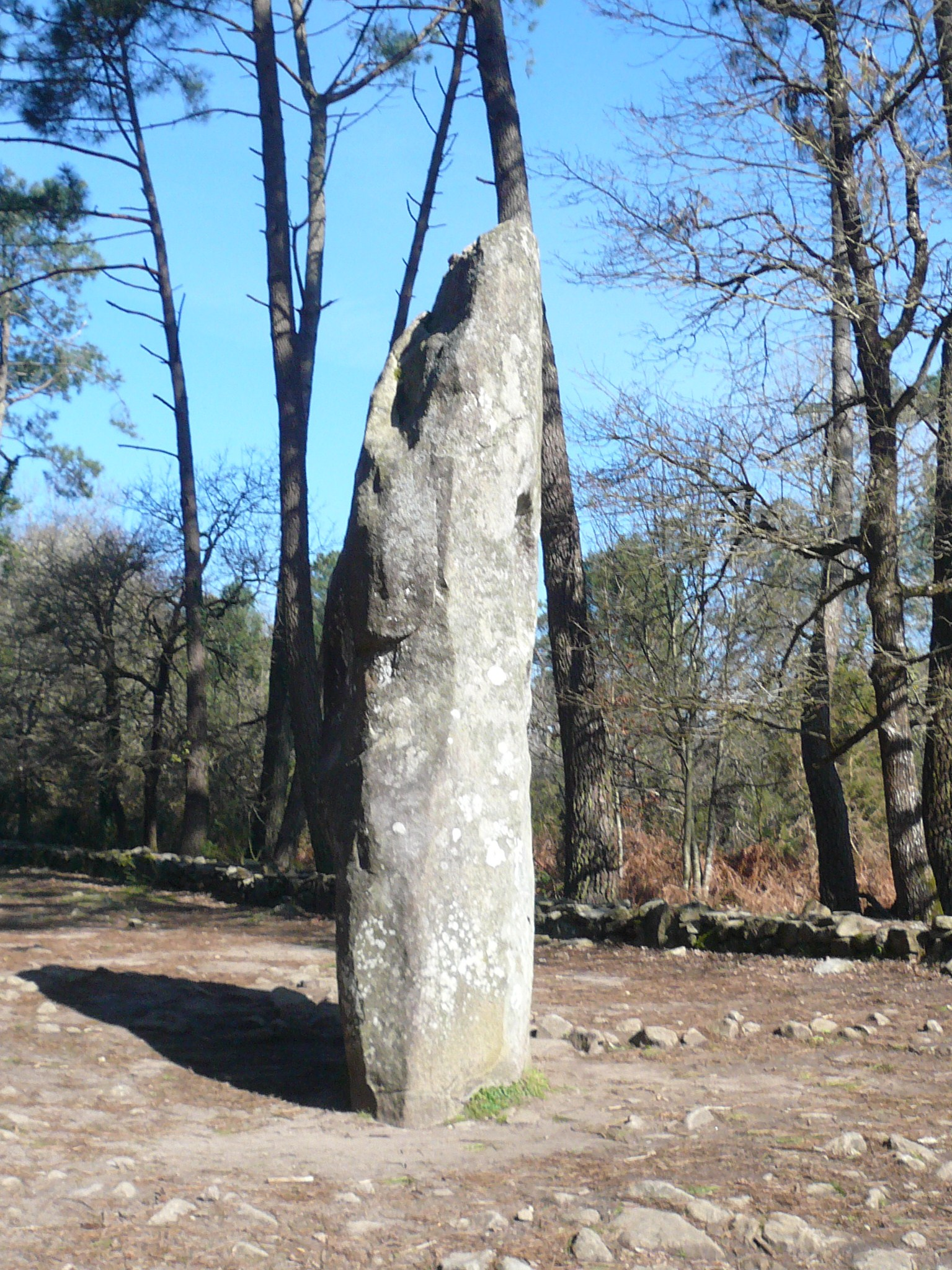 Menhir géant du Manio, vue latérale, Carnac, Morbihan, Bretagne, France.